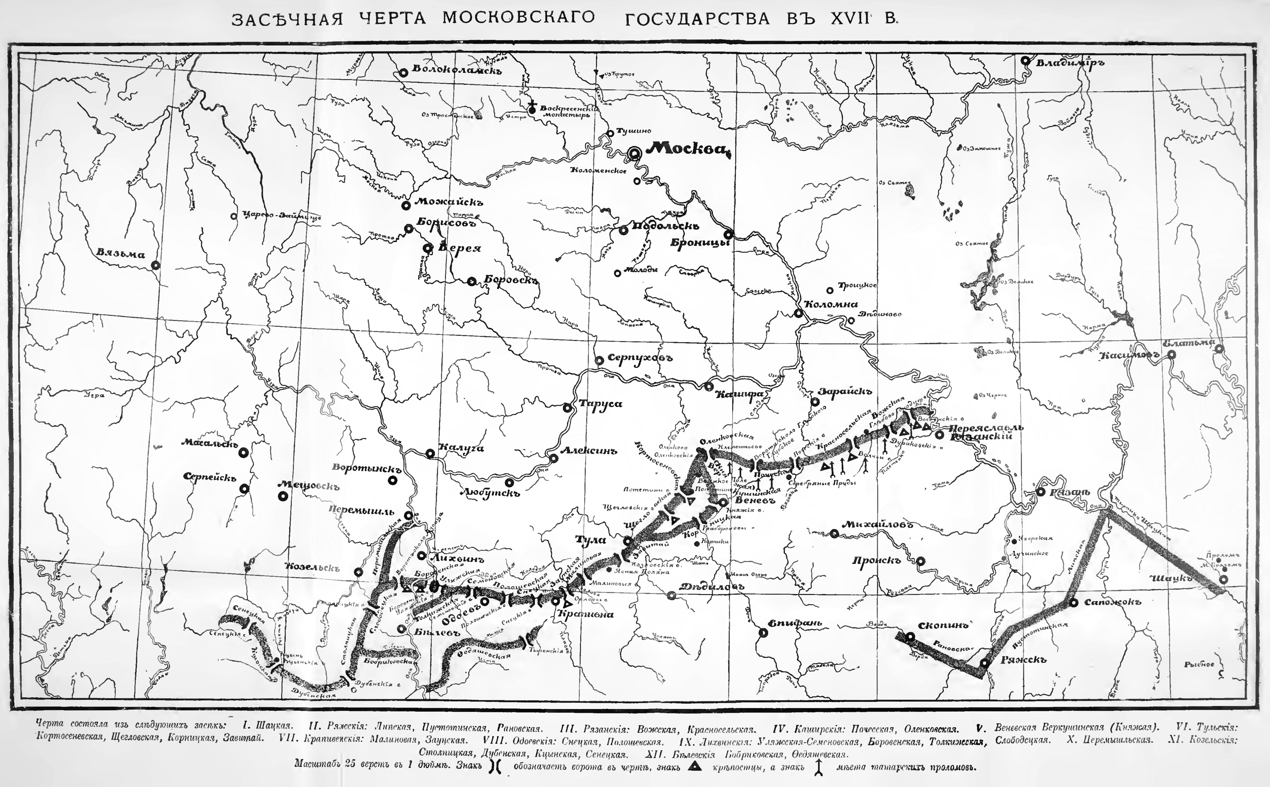 Карта Большой засечной черты. Из книги: Яковлев А. И. Засечная черта Московского государства в XVII веке. — М.: Типография И. Лисснера и Д. Собко, 1916.